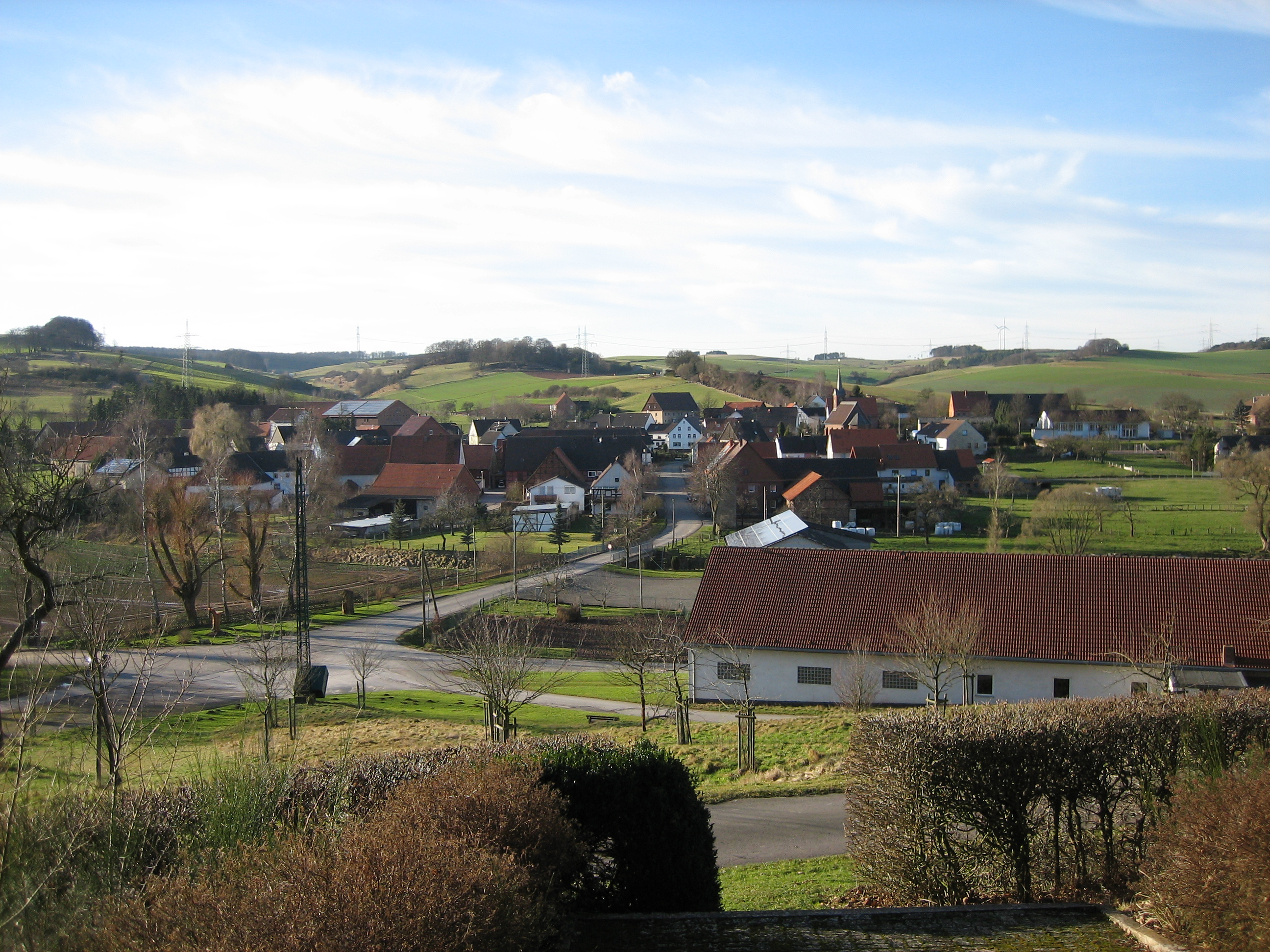 Blick auf Udorf bei Marsberg